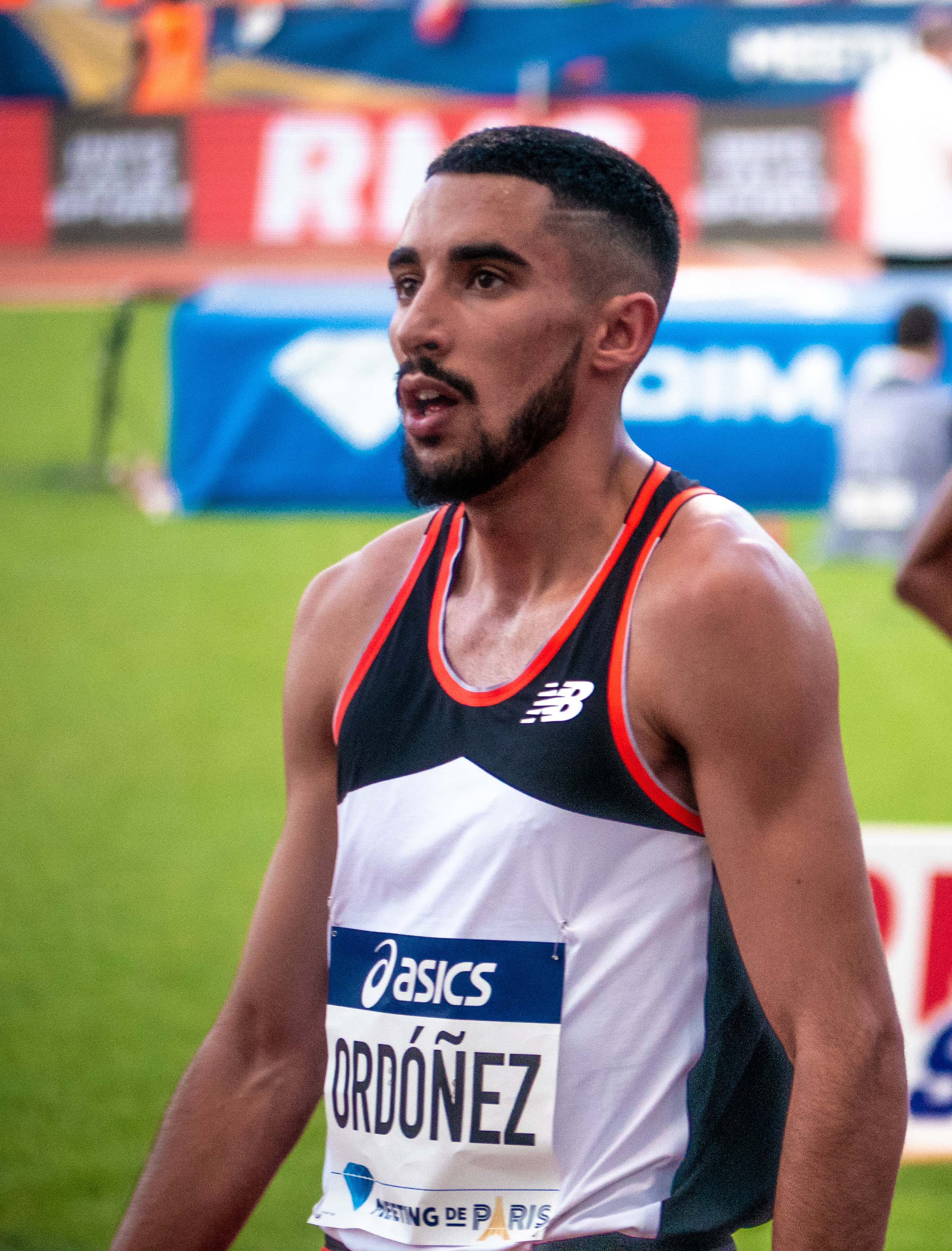 Saùl Ordonez